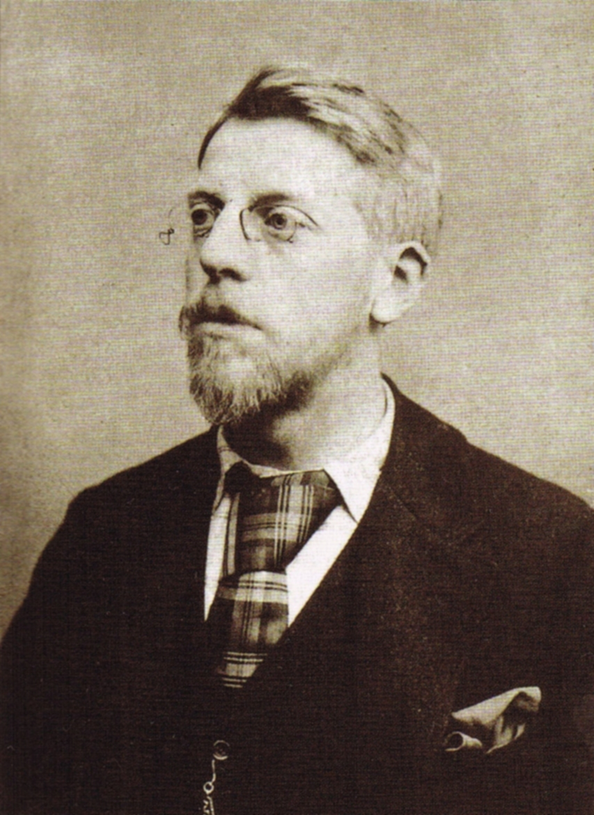 Portrait de Georges Lemmen